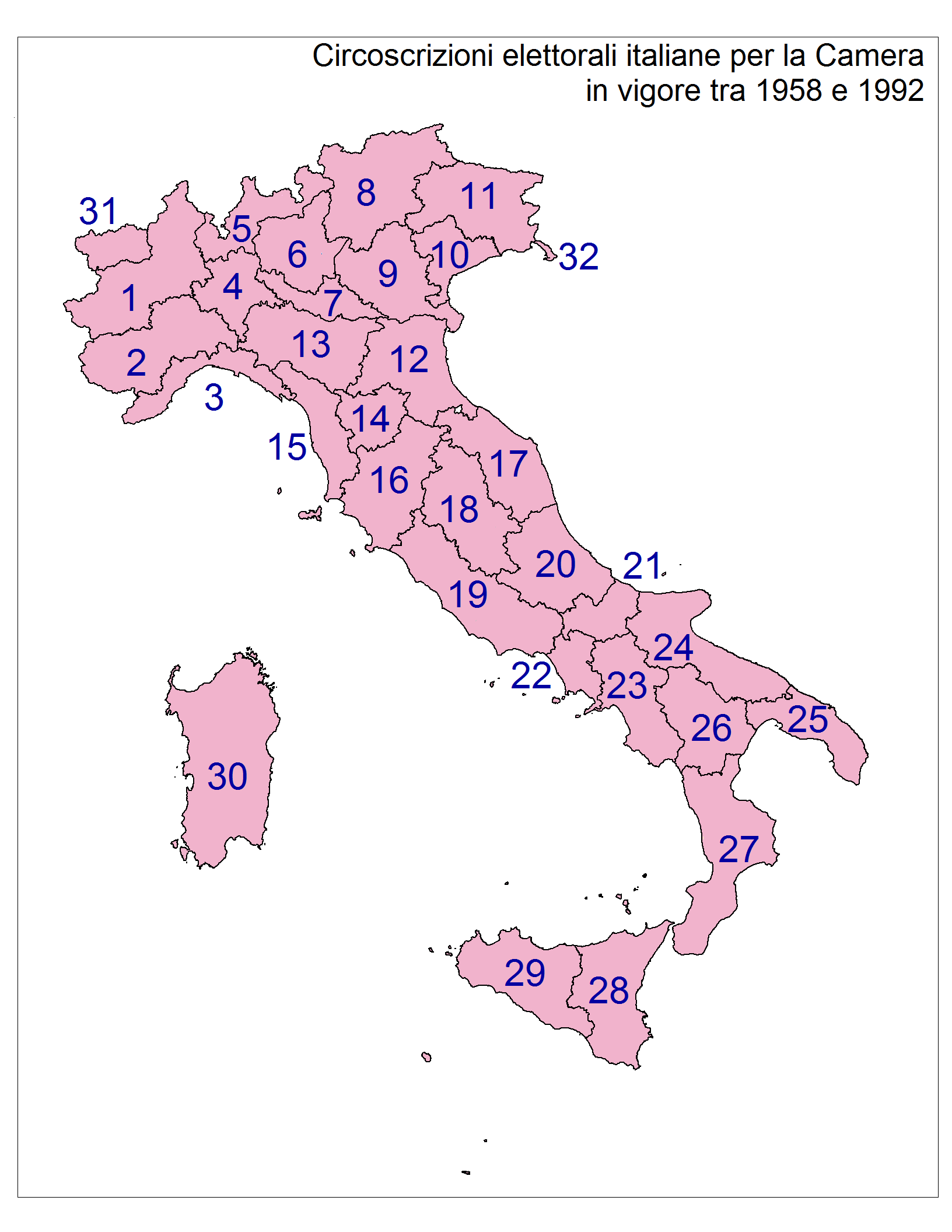 Mappa delle circoscrizioni elettorali italiane in vigore trail 1958 e il 1992 per la Camera dei Deputati.